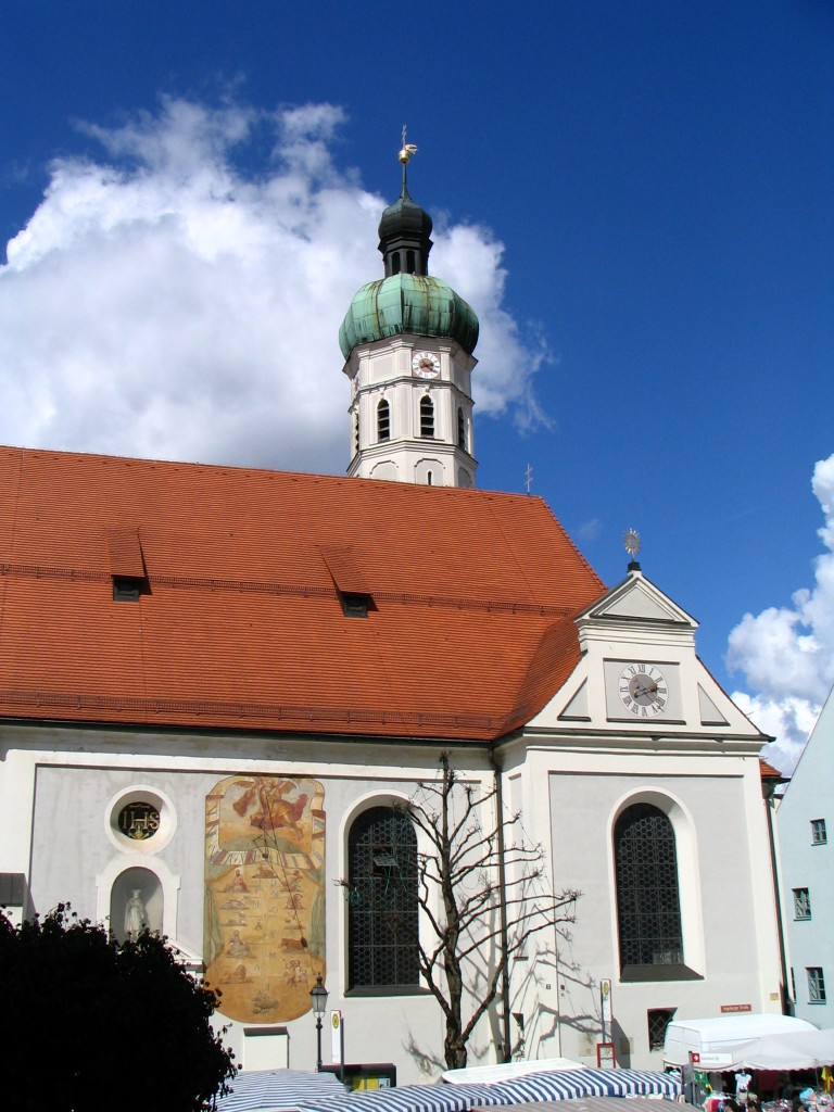 Stadtpfarrkirche St. Jakob Dachau